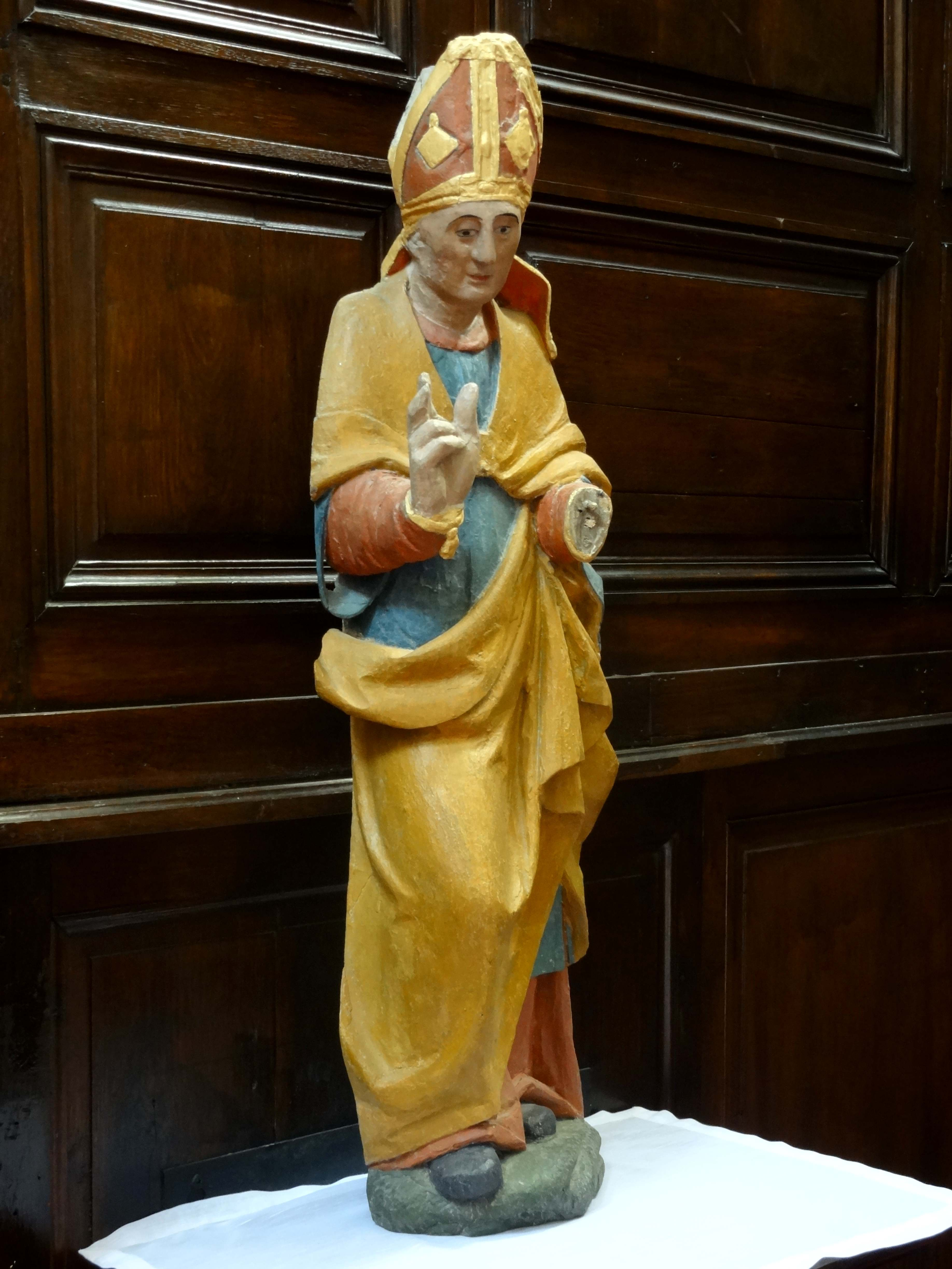 Mobilier de l'église - voir titre.